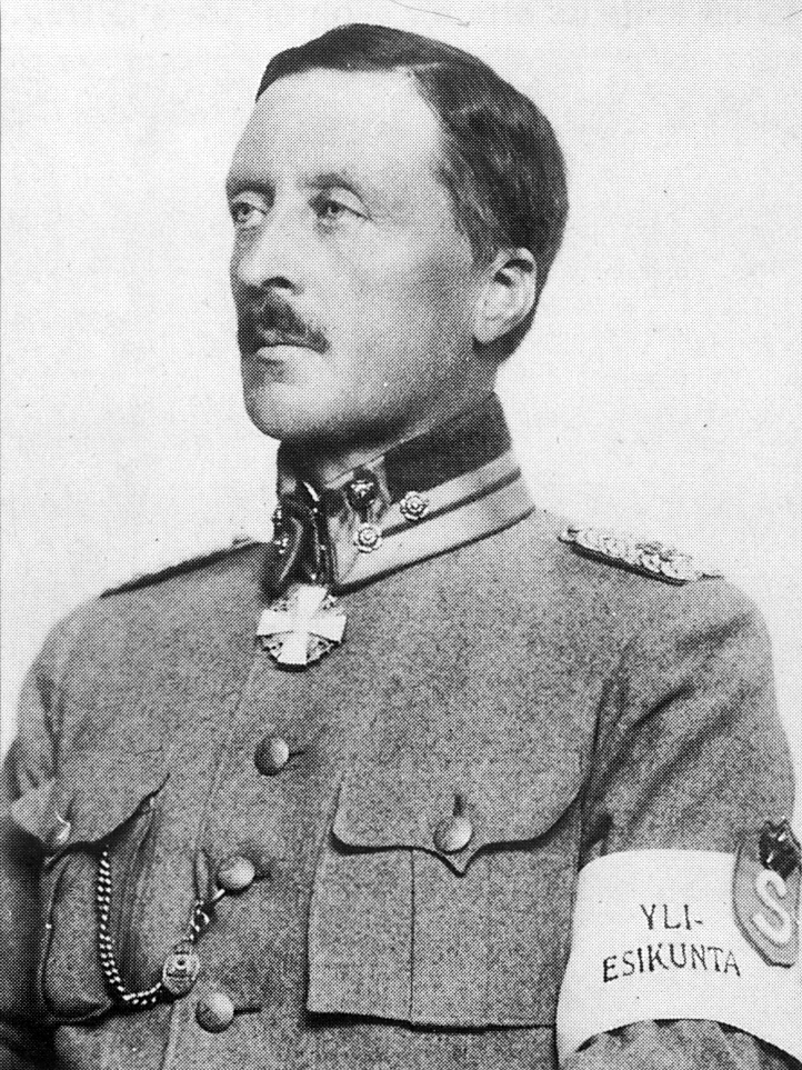 Skyddskårens förste överbefälhavare överste Georg Diedrich von Essen.